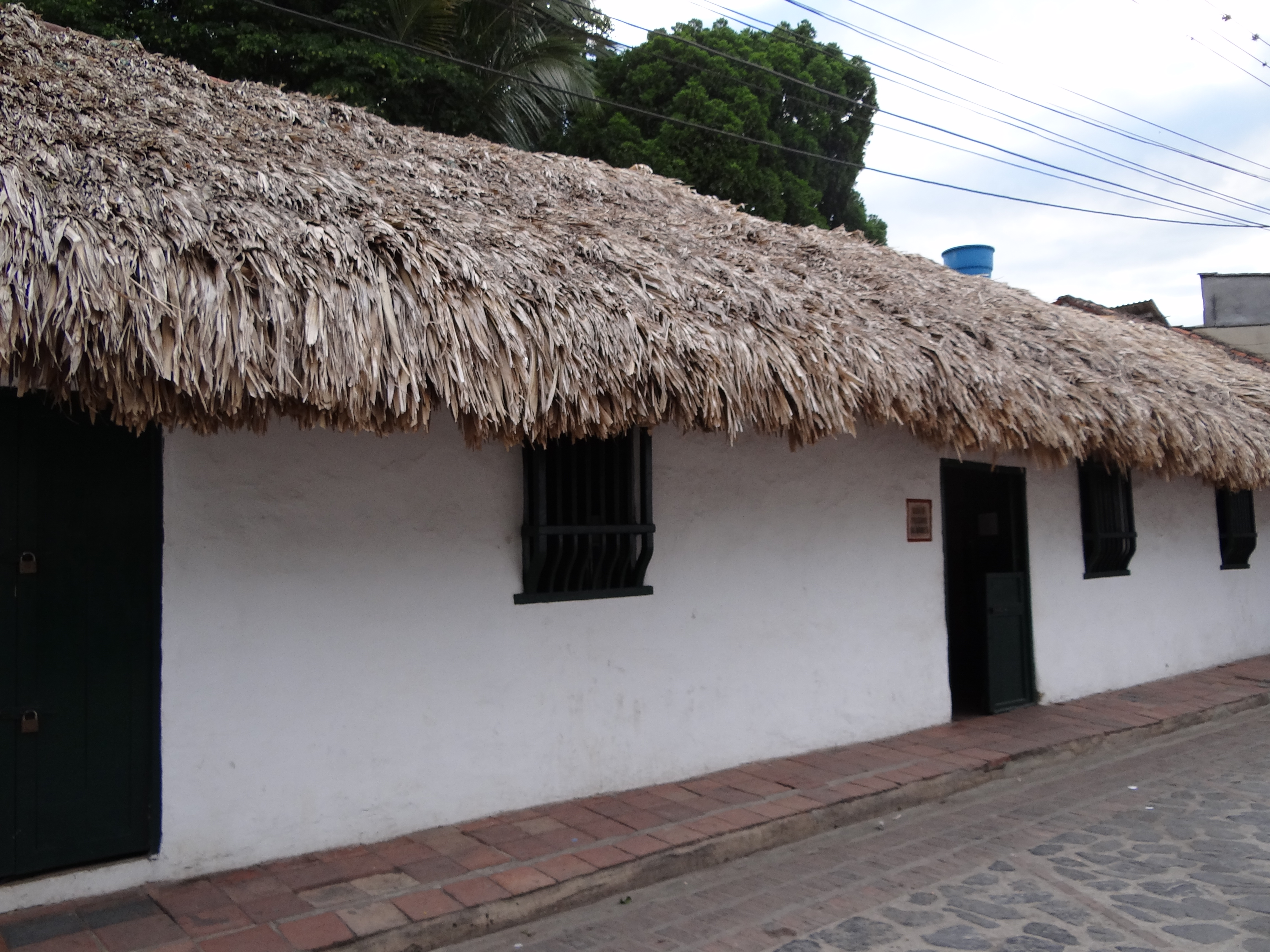 Fachada de la csa de La Pola, Guaduas Cundinamarca